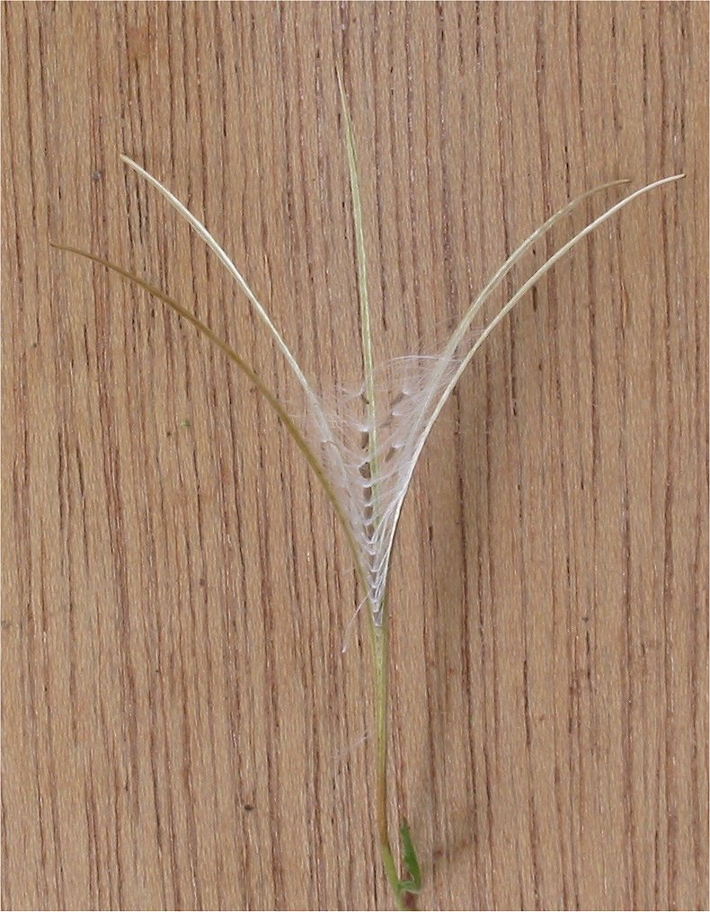 (nl: Kantige basterdwederik vrucht) Epilobium tetragonum fruit